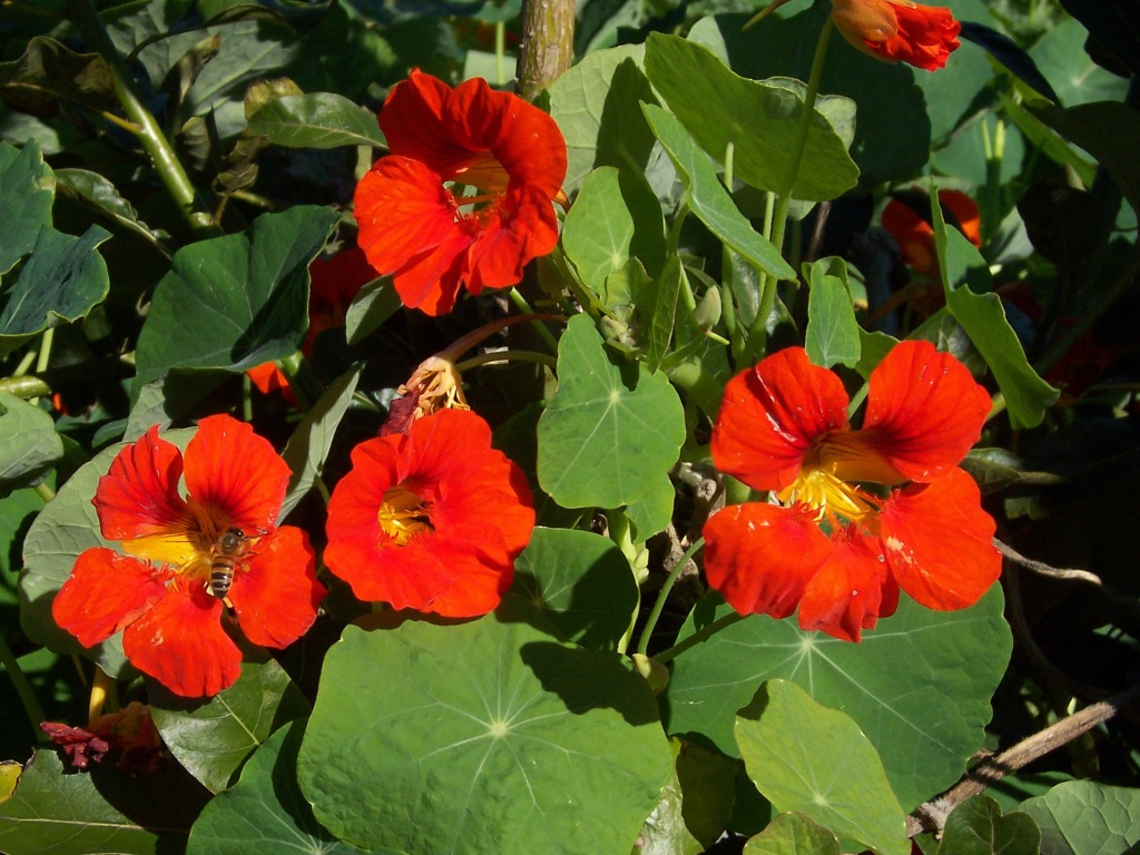 Grande capucine (Tropaeolum majus), La Réunion